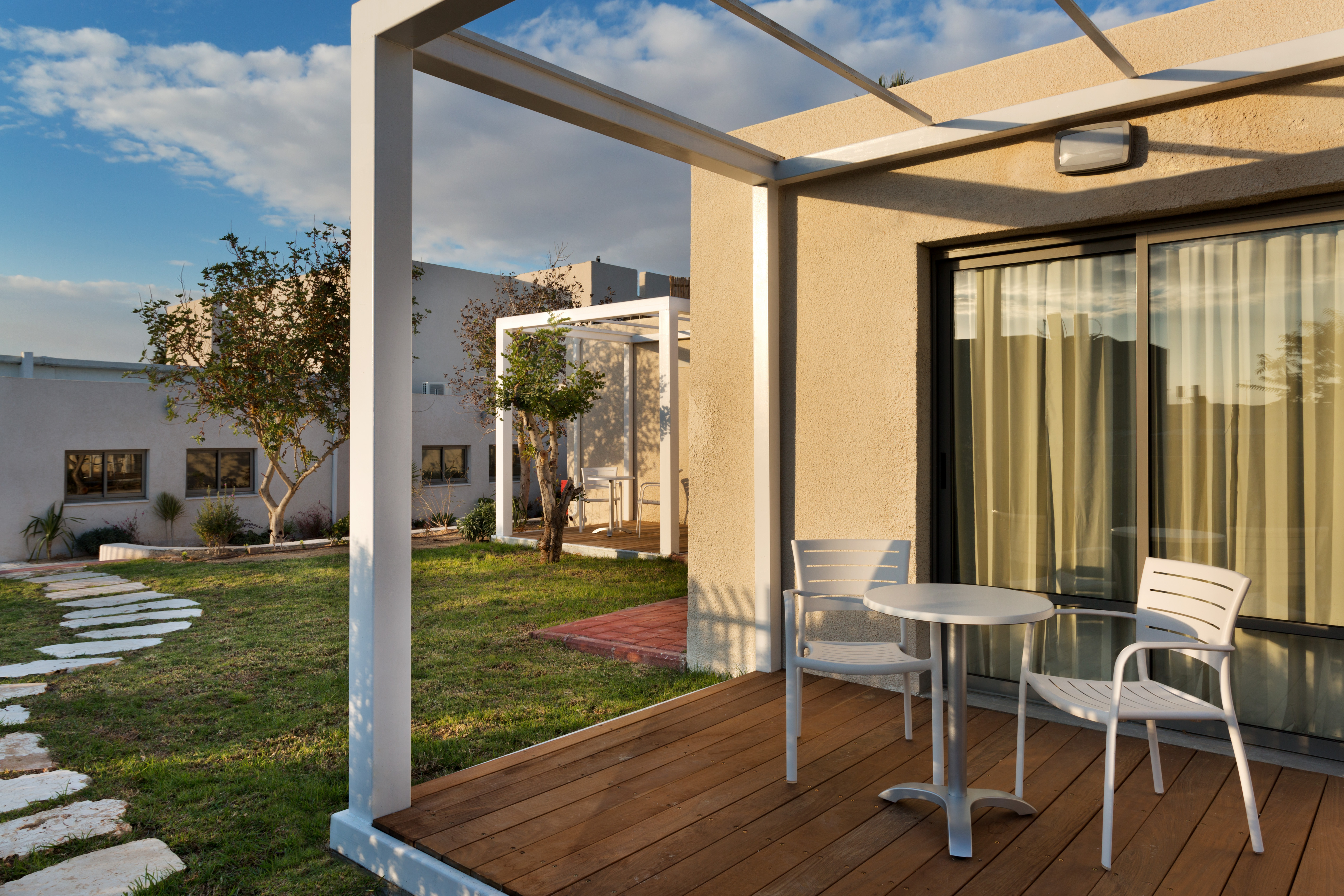 גינה פרטית צמודה לחדרי הקרקע